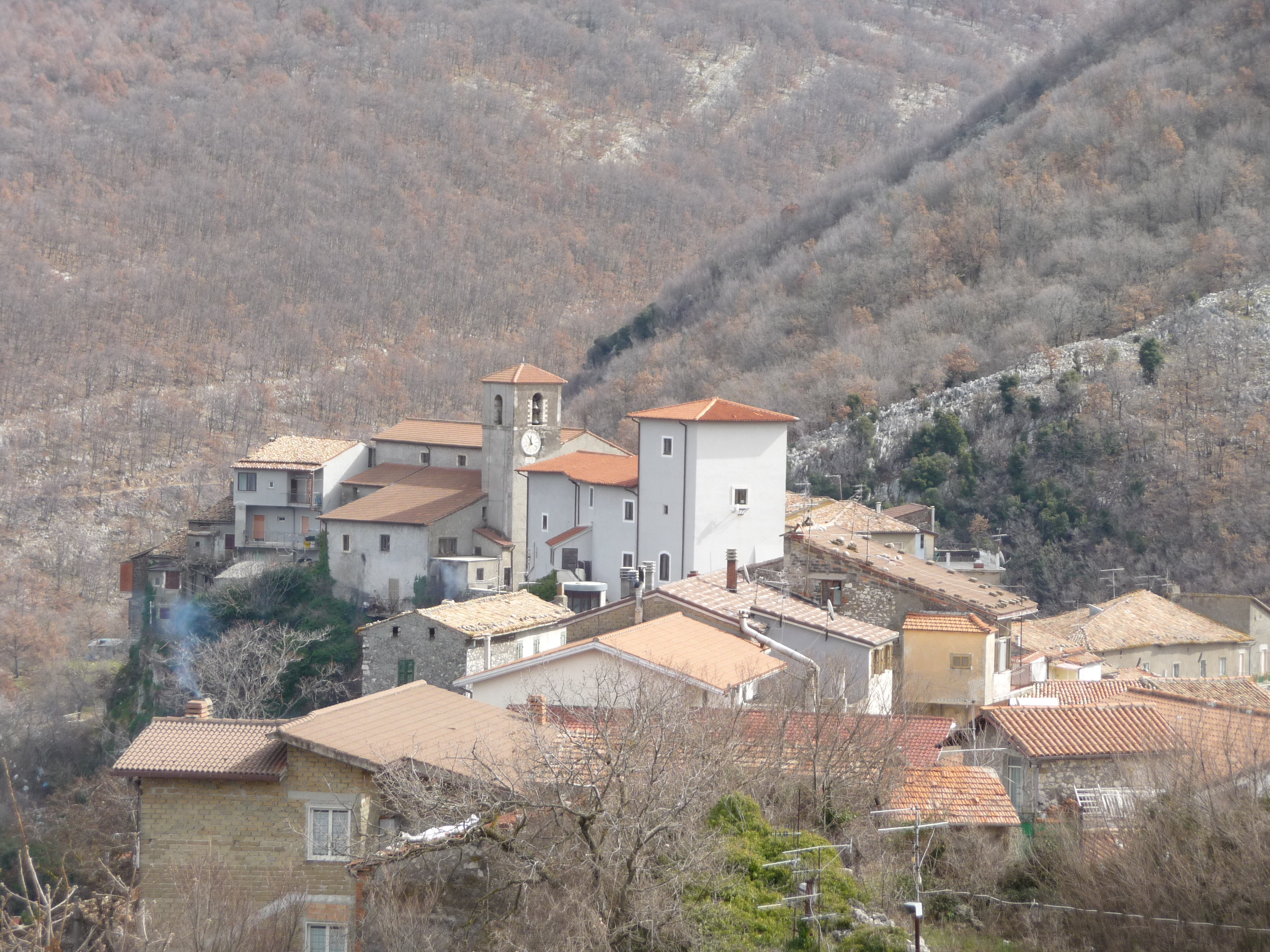 Vista su Gorga